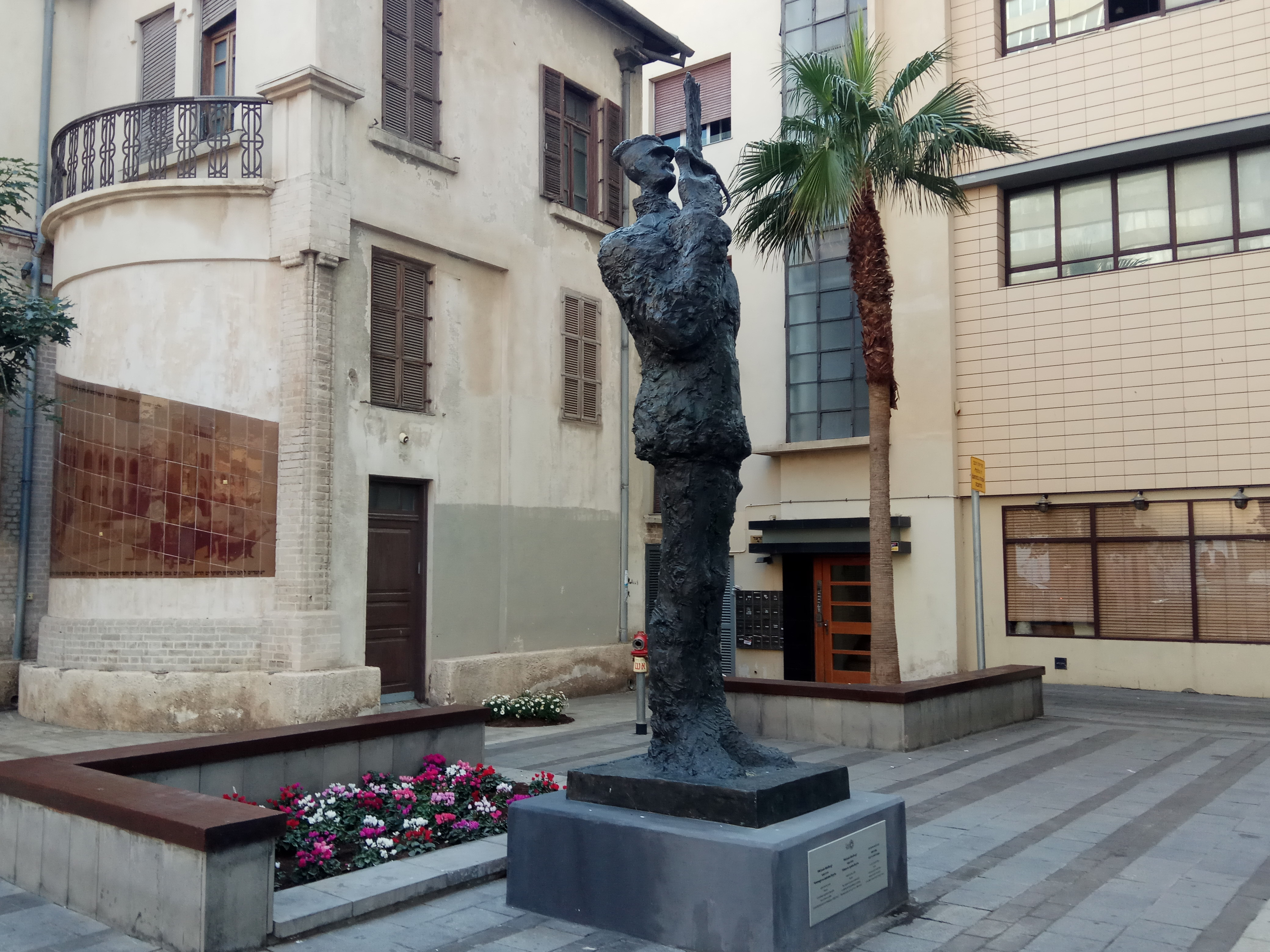 פסל אלפרד דרייפוס מאת טים (לואי מיטלברג) ברחוב אחד העם בתל אביב